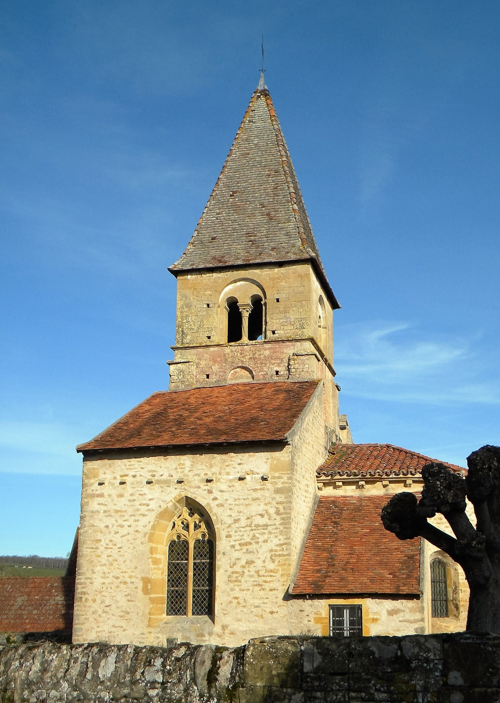 Eglise de Changy (Saône-et-Loire)